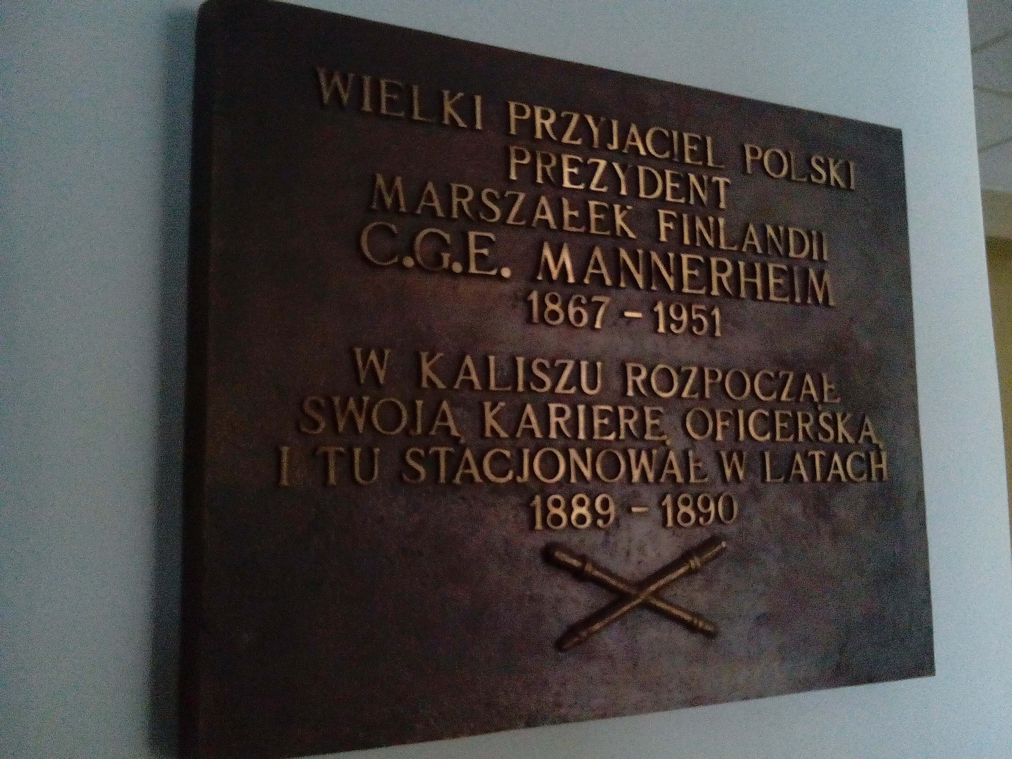 Memorial plate in Kalisz